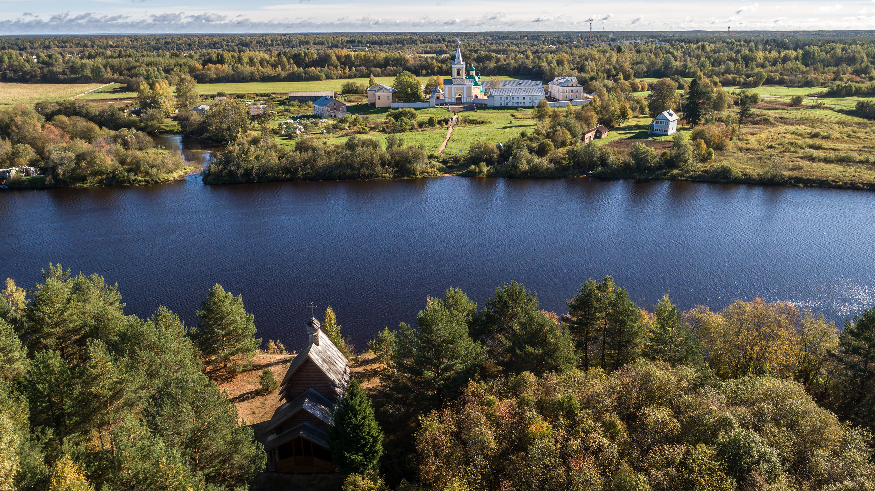 Река Оять и Часовня преподобного Александра Свирского и вид на Введено-Оятский монастырь. Введено-Оятский женский монастырь. Монастырь был основан в XIV веке, расположен в северо-восточной части Ленинградской области, на берегу реки Оять. В обители покоятся родители преподобного Александра Свирского - св. преп. Сергий и Варвара. На территории монастыря есть целебные радоновые источники.